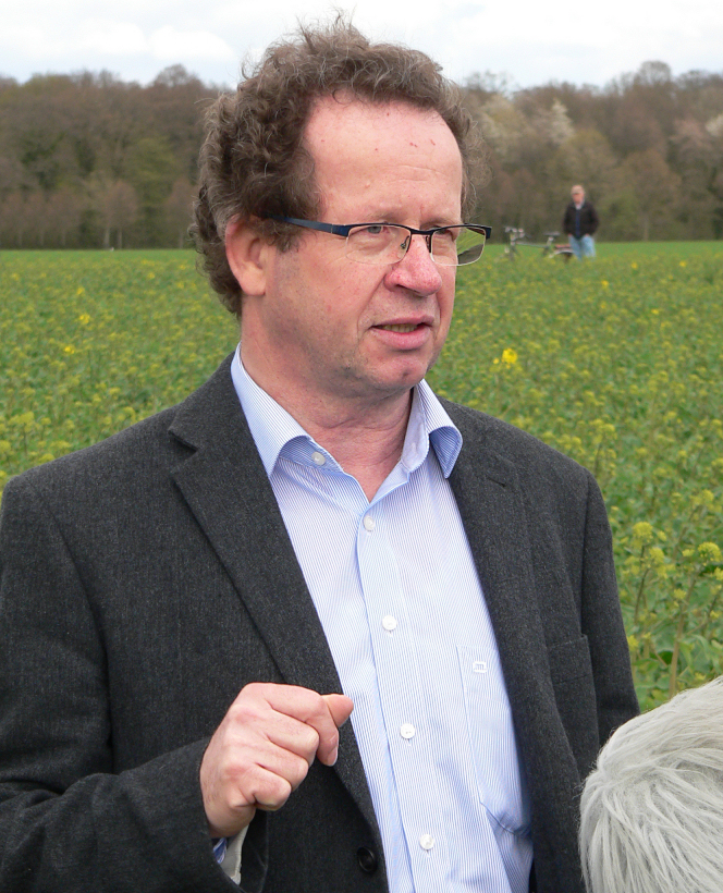 Heinz-Gerd Röhling bei einem Interview während der Bergung des Findlings von Ostermunzel